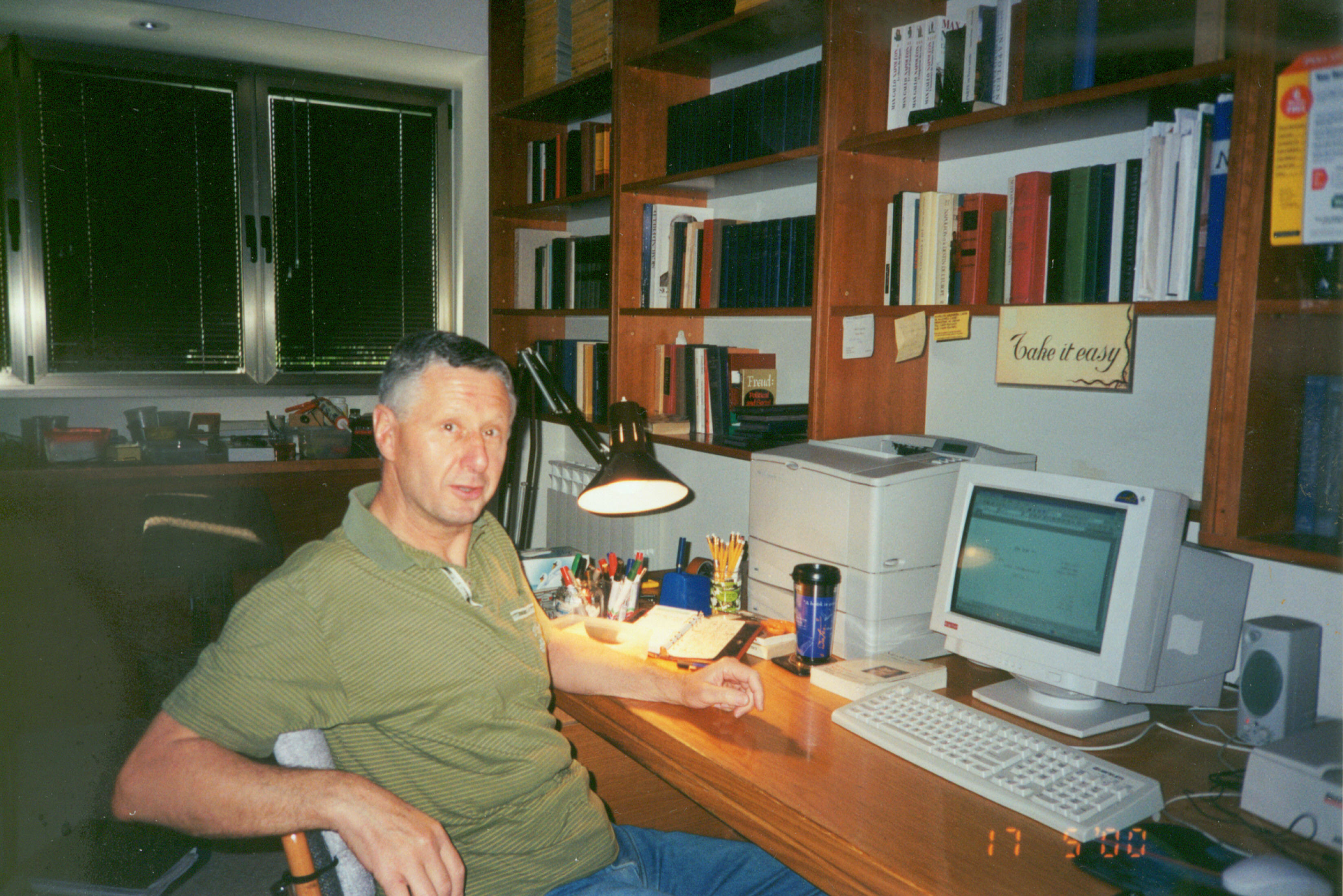 אבנר פלק הוא פסיכולוג קליני, פסיכותרפיסט, פסיכוביוגרף, פסיכוהיסטוריון ופסיכולוג פוליטי